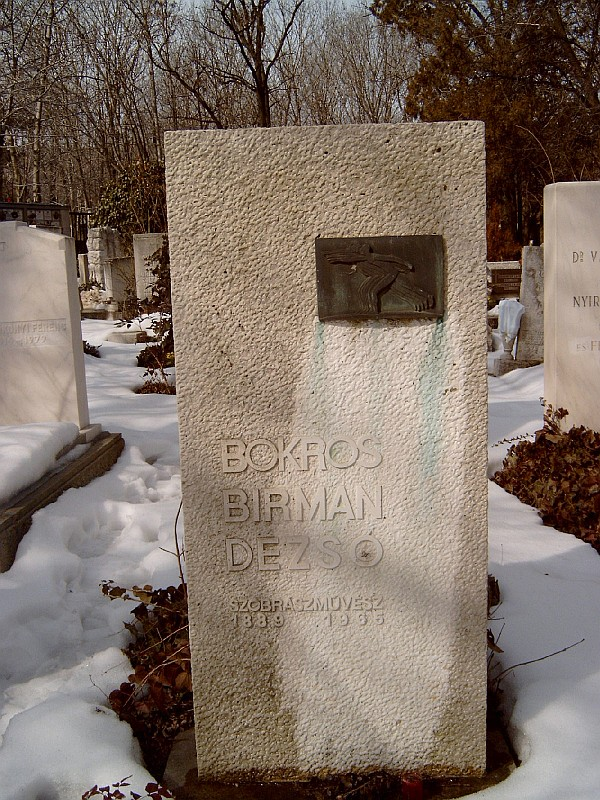 Bokros Birman Dezső sírja. A síremlékén található kisméretű bronz domborművőn, négy futó alak látható (1933). Budapesten. Farkasréti temető: 33/3-1-20.